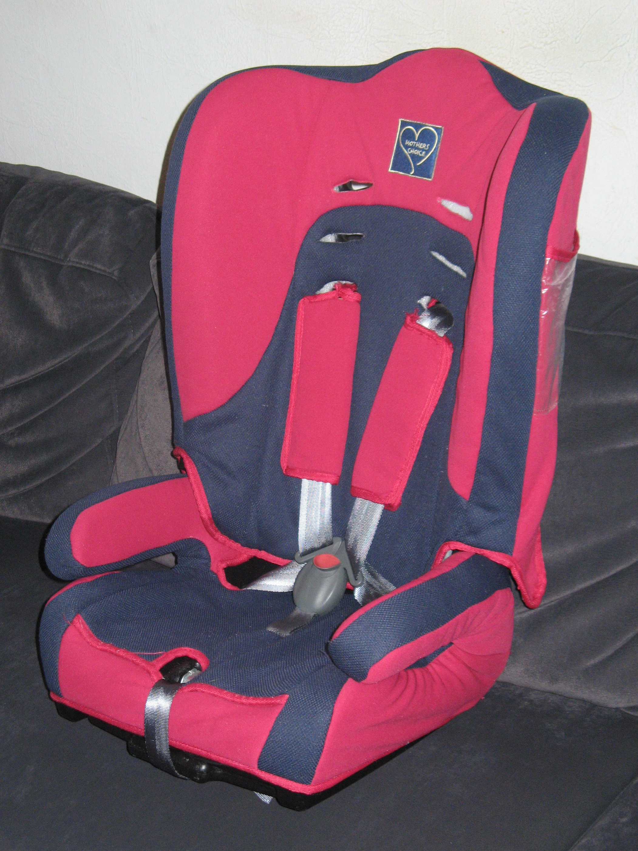 Kindersitz der Marke Mother Choice. Freigaben nach ECE R44/04 Gruppe I für 9-18 kg oder mit abgenommenen Rückenteil für Gruppe II und III für 15-36 kg